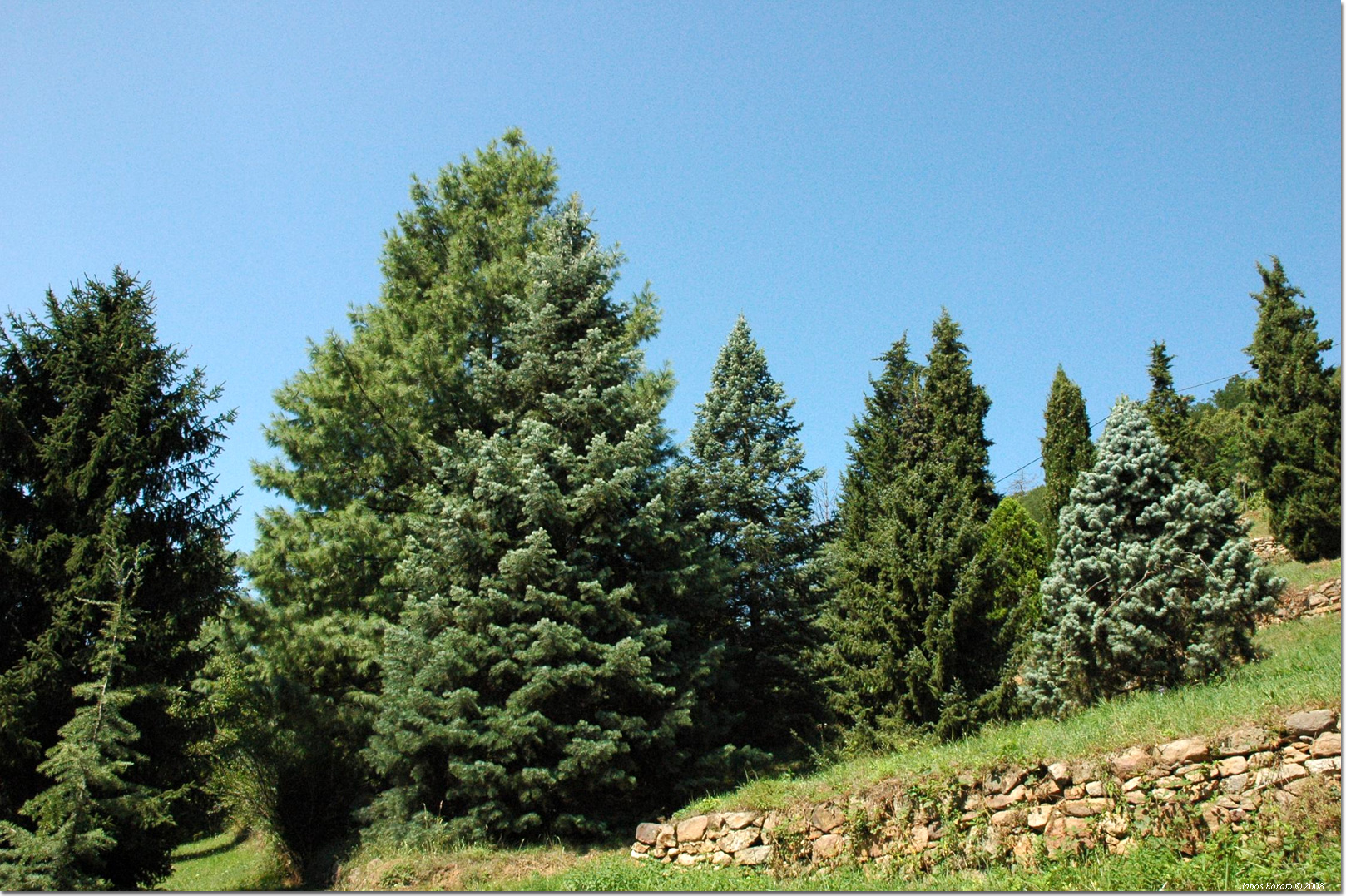 Folly arborétum fenyőfák Az arborétum ma három különböző korú növénypopulációt tartalmaz. A Folly család több mint száz éve gyűjti a különleges ciprusokat, cédrusokat és fenyőket a Badacsony oldalában